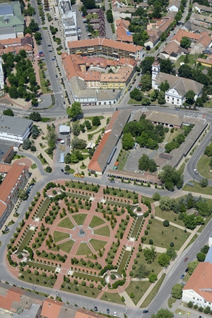 Orosháza